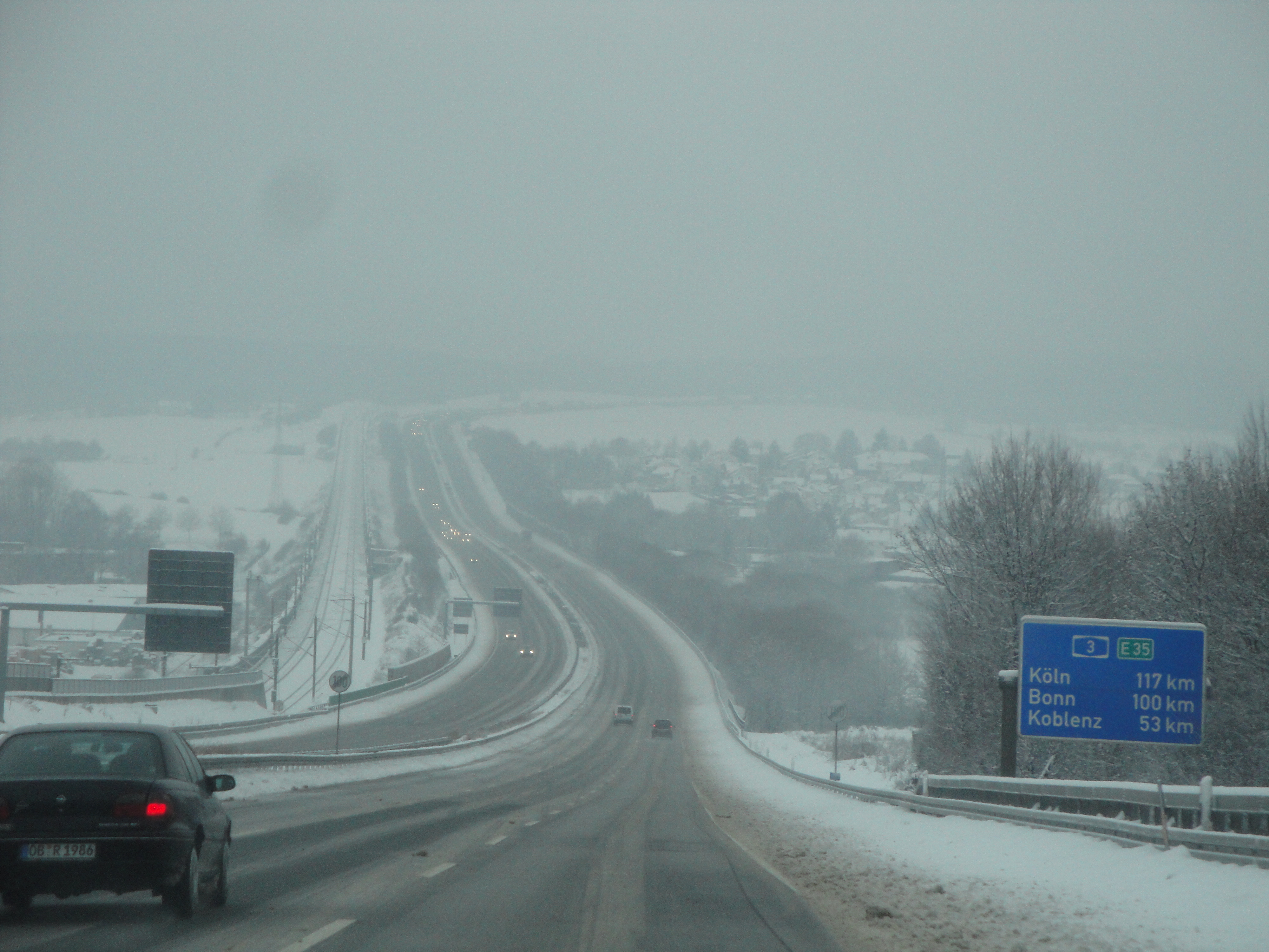 Bundesautobahn A3 im Winter zwischen Frankfurt und Köln (Elzer Berg bei Limburg)